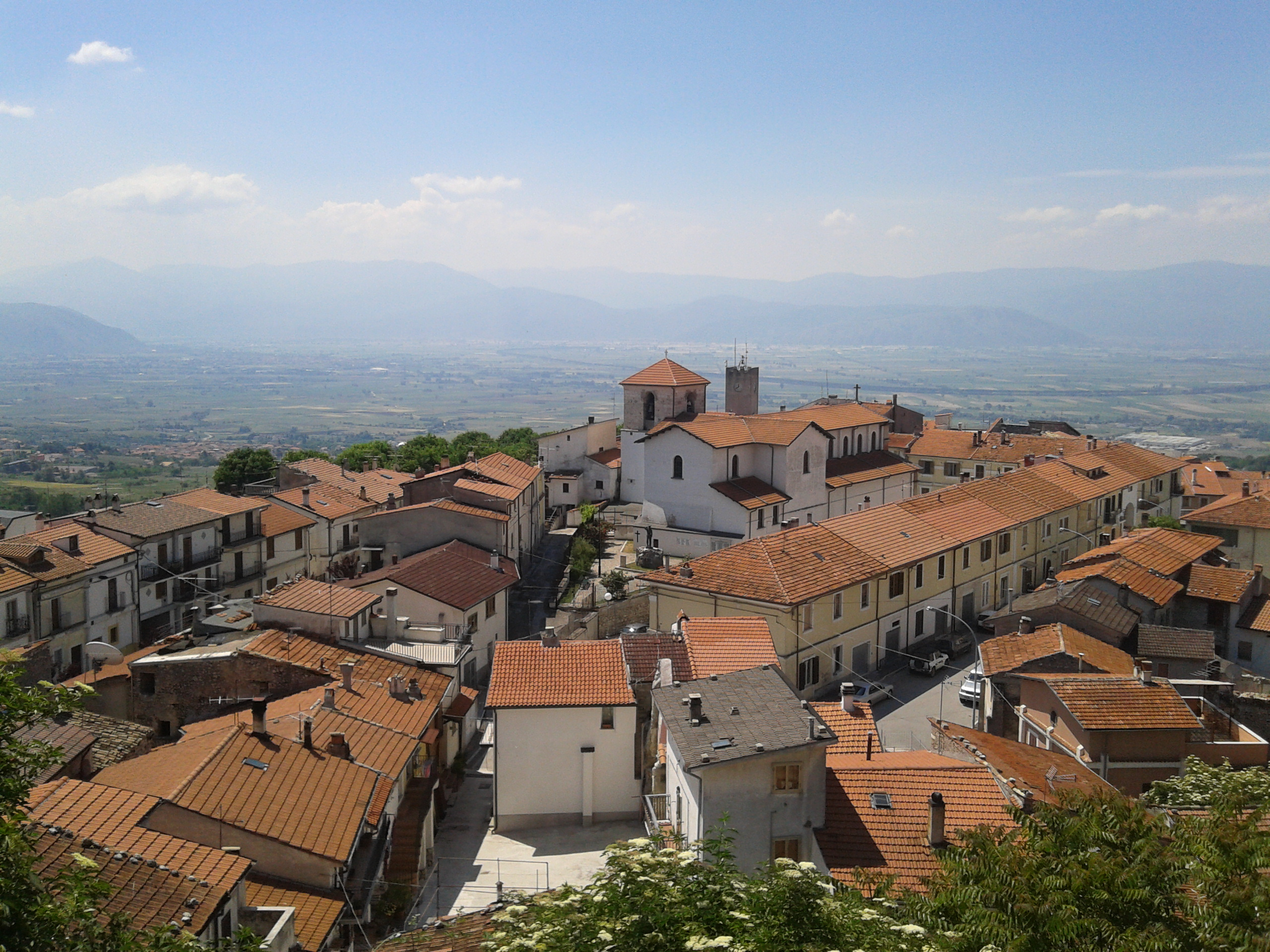 Aielli alto